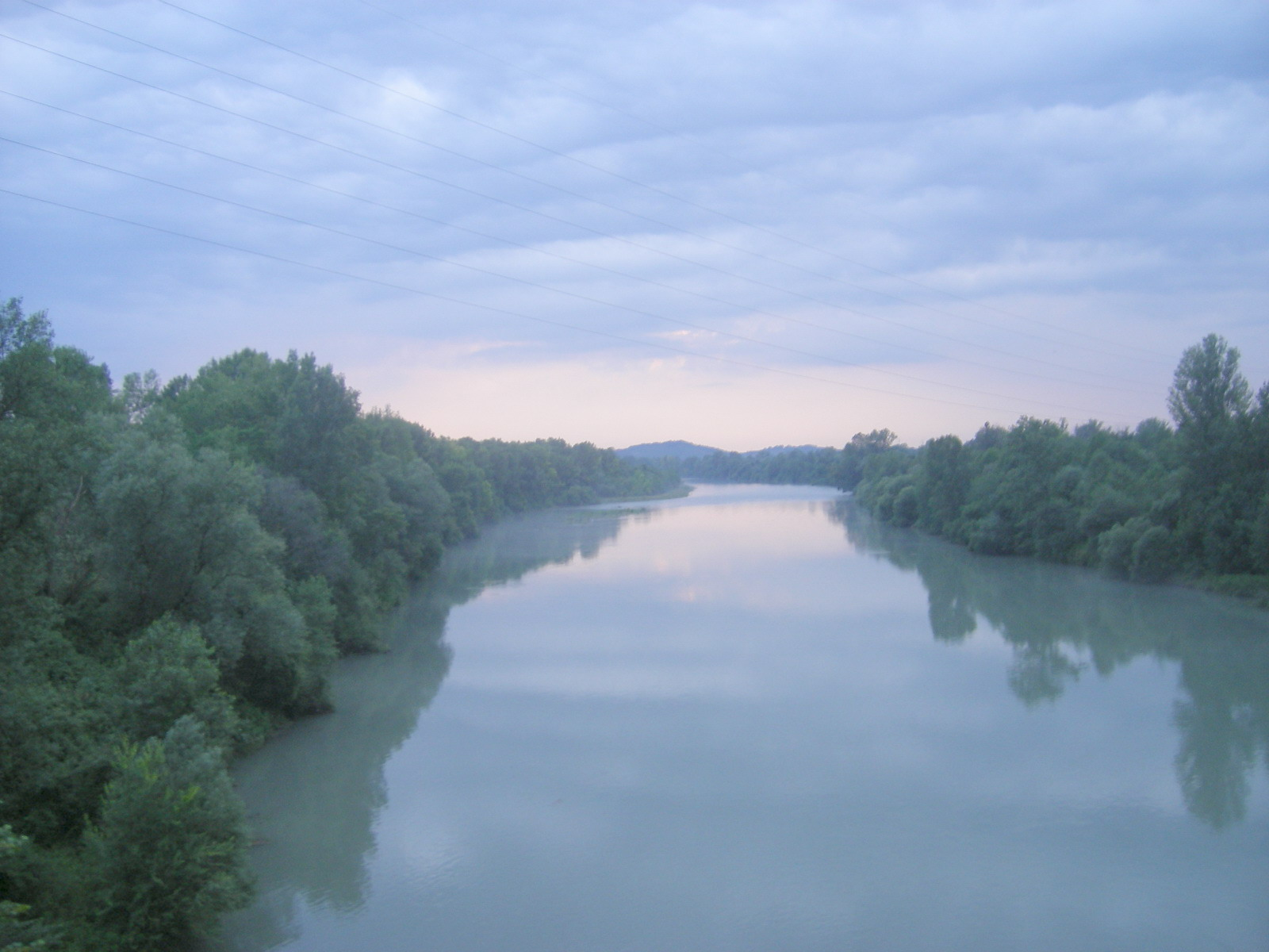 Isonzo River at Gorizia